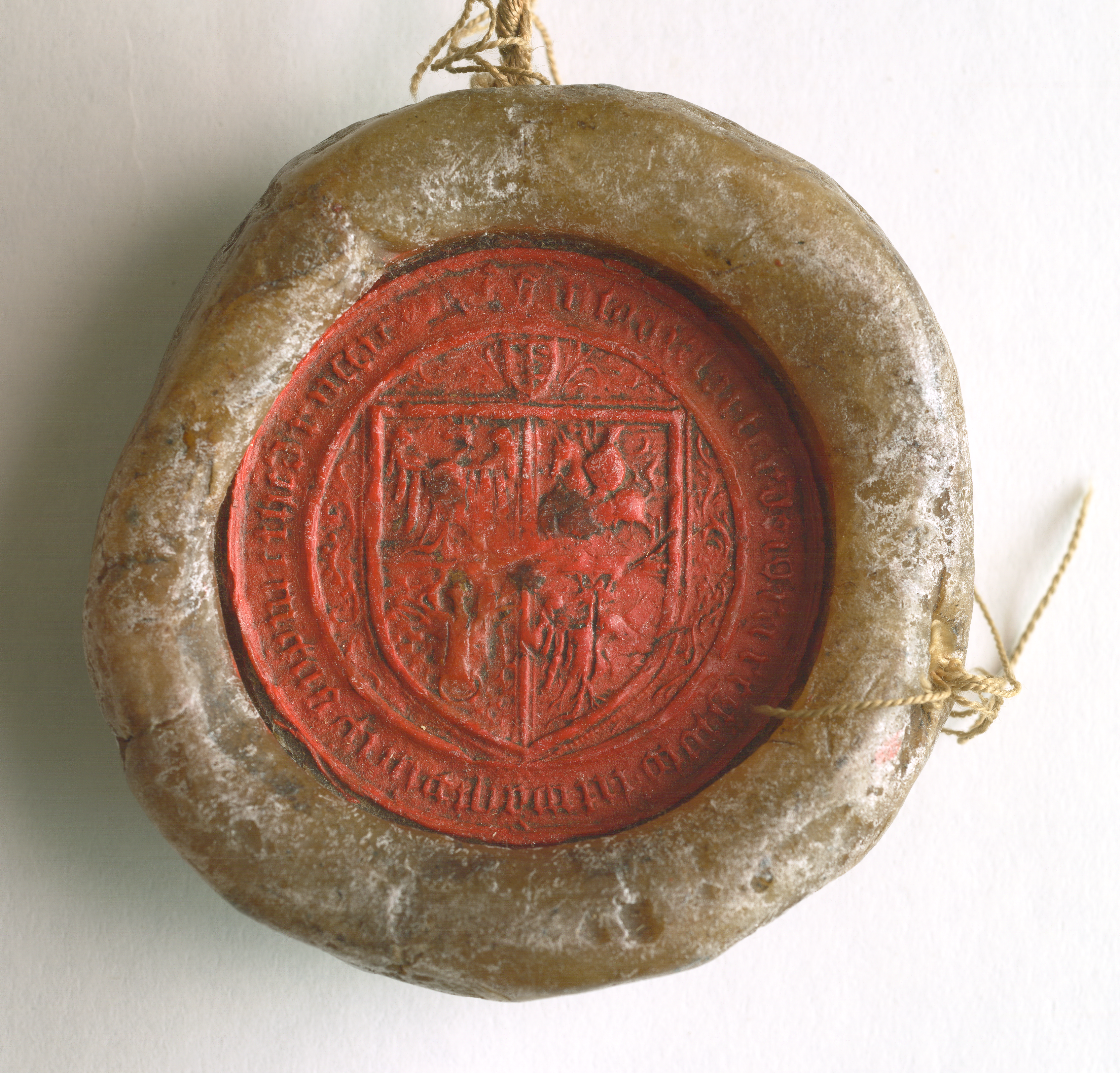 Pieczęć Władysława Warneńczyka, na biało-różowym sznurze odciśnięta w czerwonym wosku. W polu pieczęci tarcza 4-polowa: w polu 1 - Orzeł, w polu 2 - Pogoń, w polu 3 - herb kaliski (wielkopolski), w polu 4 - herb kujawski. Wokół tarczy ornamenty, powyżej tarcza z podwójnym krzyżem jagiellońskim. Legenda: S ' WLADISLAI ' TER " DEI GRA ' REG " POLO ' LITWA Q3 ' PNCIP ' SUPM ET HED RUSSIE ' ETCET.